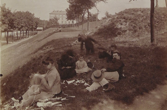 Le Paris de la Belle Epoque. Fortifications, Porte d'Auteuil.